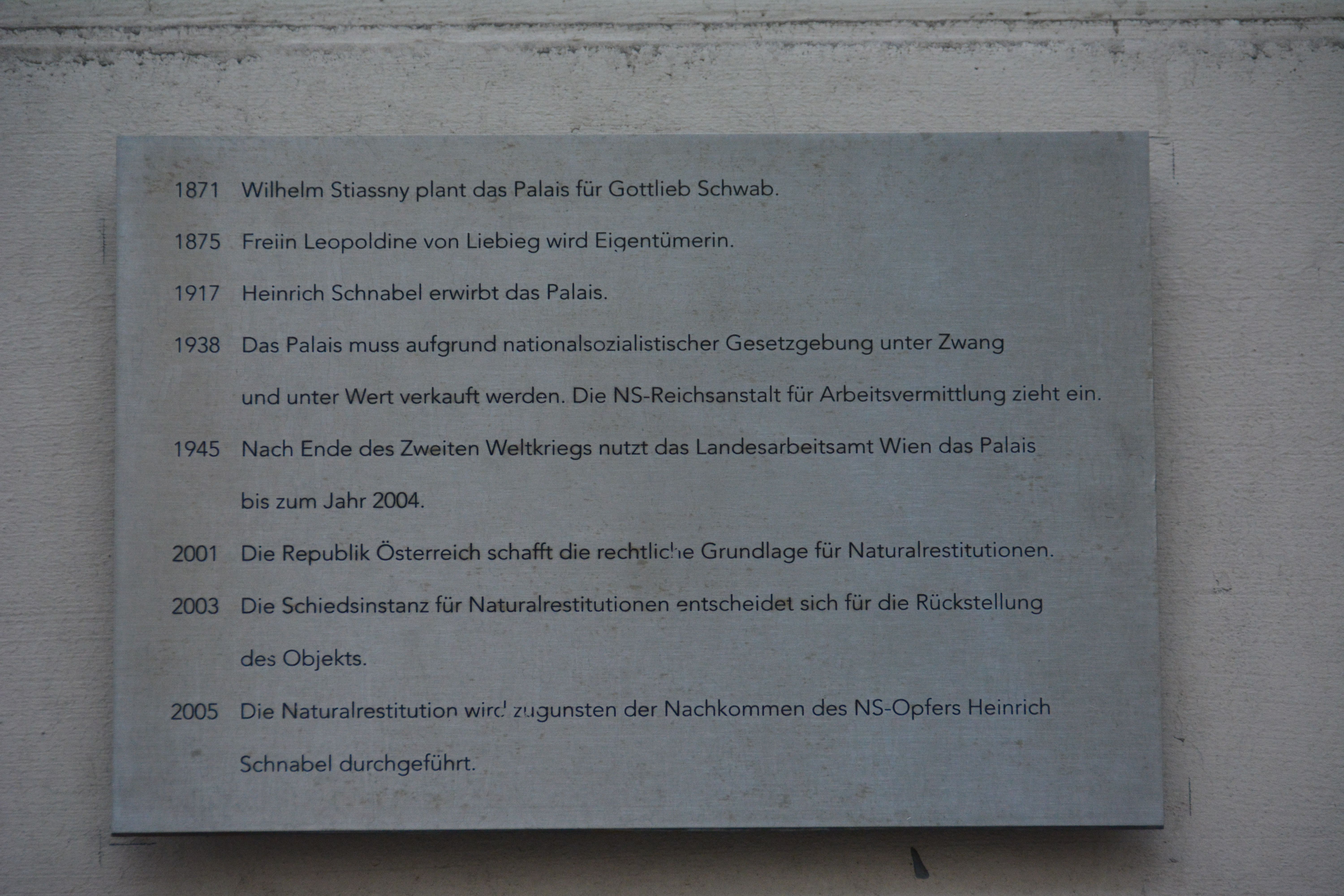 Gedenktafel für das Palais Schwab (Wien, Weihburggasse 30)